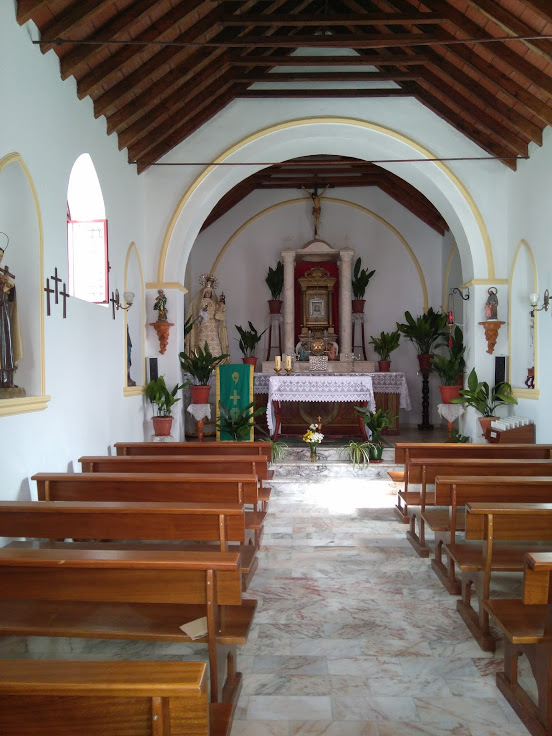 Interior de la Ermita del Señor de las Tres Marías de Zafarraya